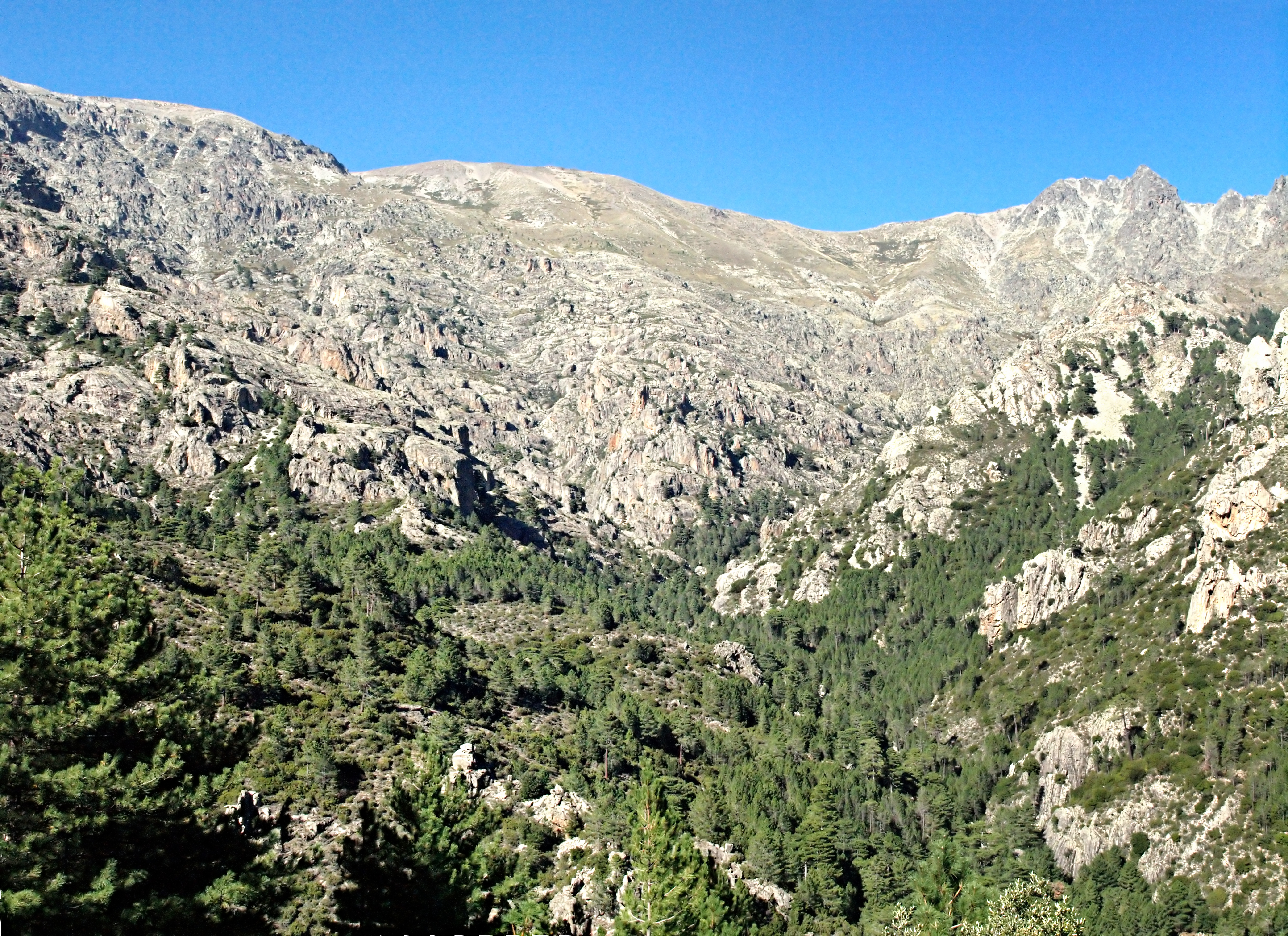 Venaco, Centre Corse - Vallon du ruisseau de Paratella (affluent du ruisseau de Verjello) qui nait sur le flanc sud du Monte Cardo (à droite)